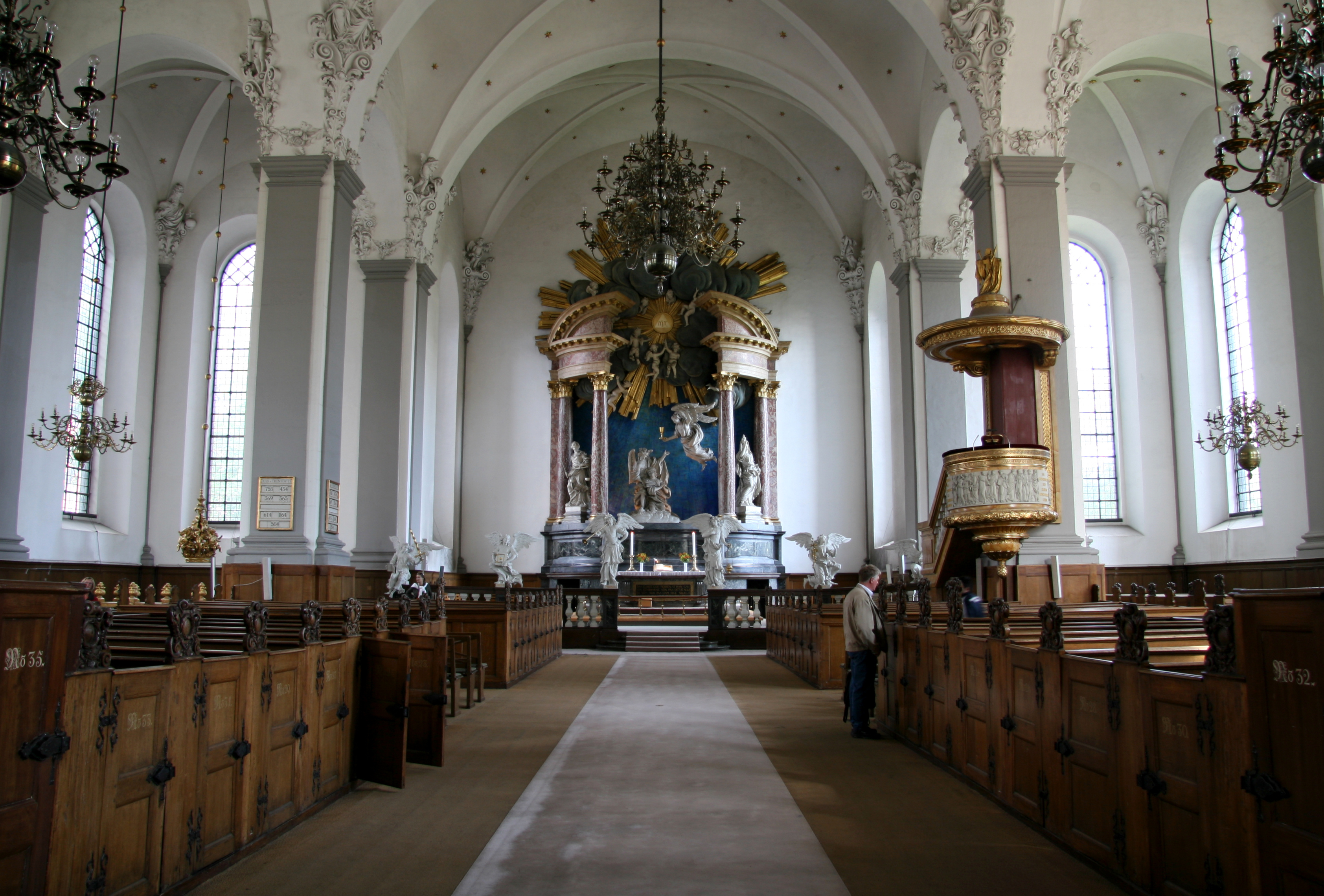 Vor Frelser Kirke (Church of Our Saviour), Copenhagen, Denmark. Interior